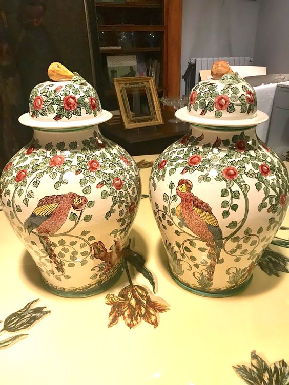 Mario Gambetta e Giuseppe Mazzotti - Manifattura Alba Docilia. Coppia di potiche in stile mezzaro. Albisola. Anni '20 del XX secolo. Bibliografia: Enciclopedia delle moderne arti decorative italiane III. Le arti del fuoco: ceramica-vetri-vetrate di Guido Marangoni (1927). Decoro esposto alla Biennale di Monza del 1927.